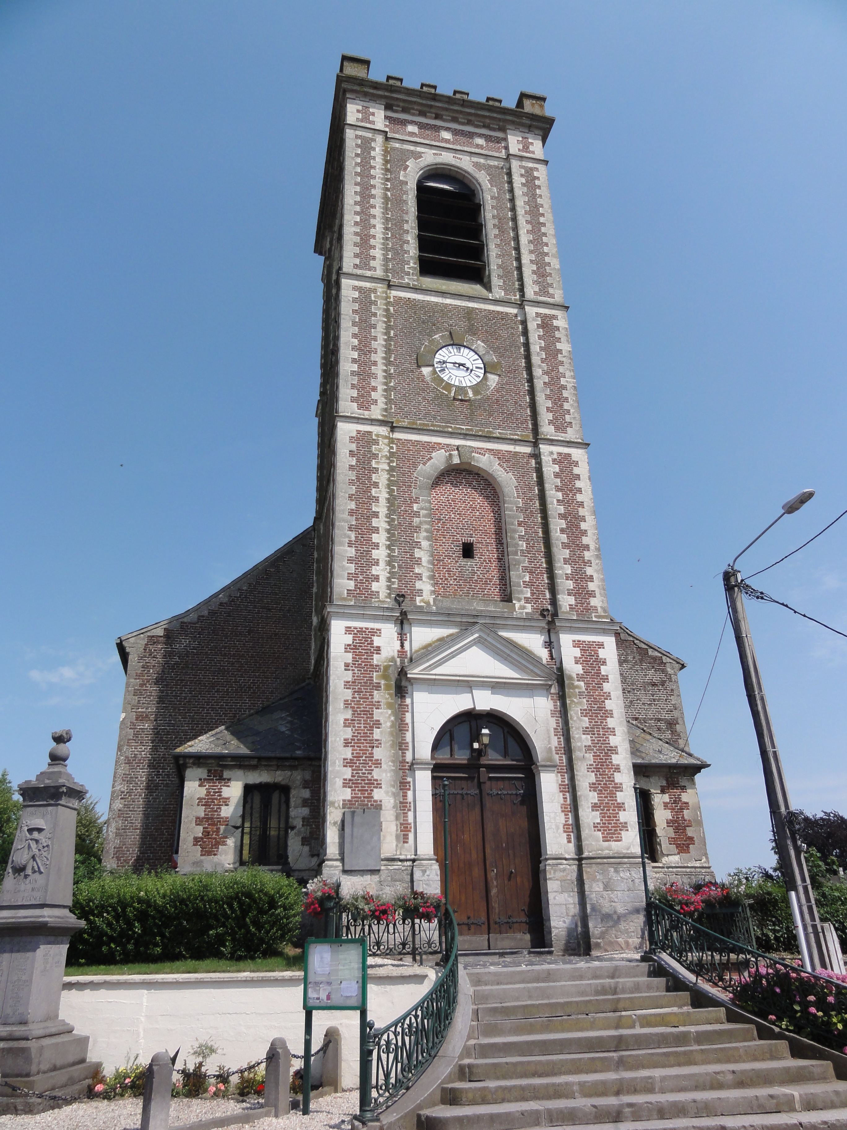 Jenlain (Nord, Fr) église